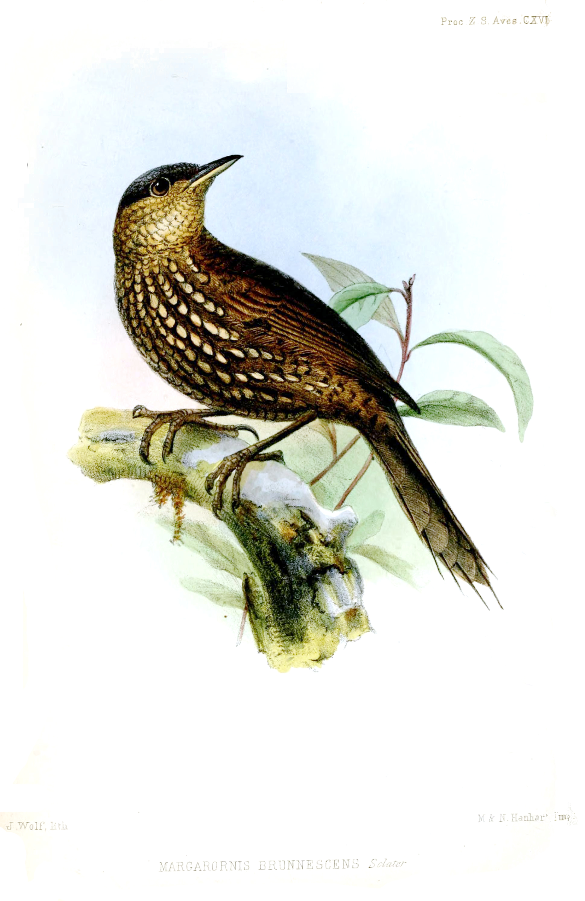 Margarornis brunnscens=Premnoplex brunnescens